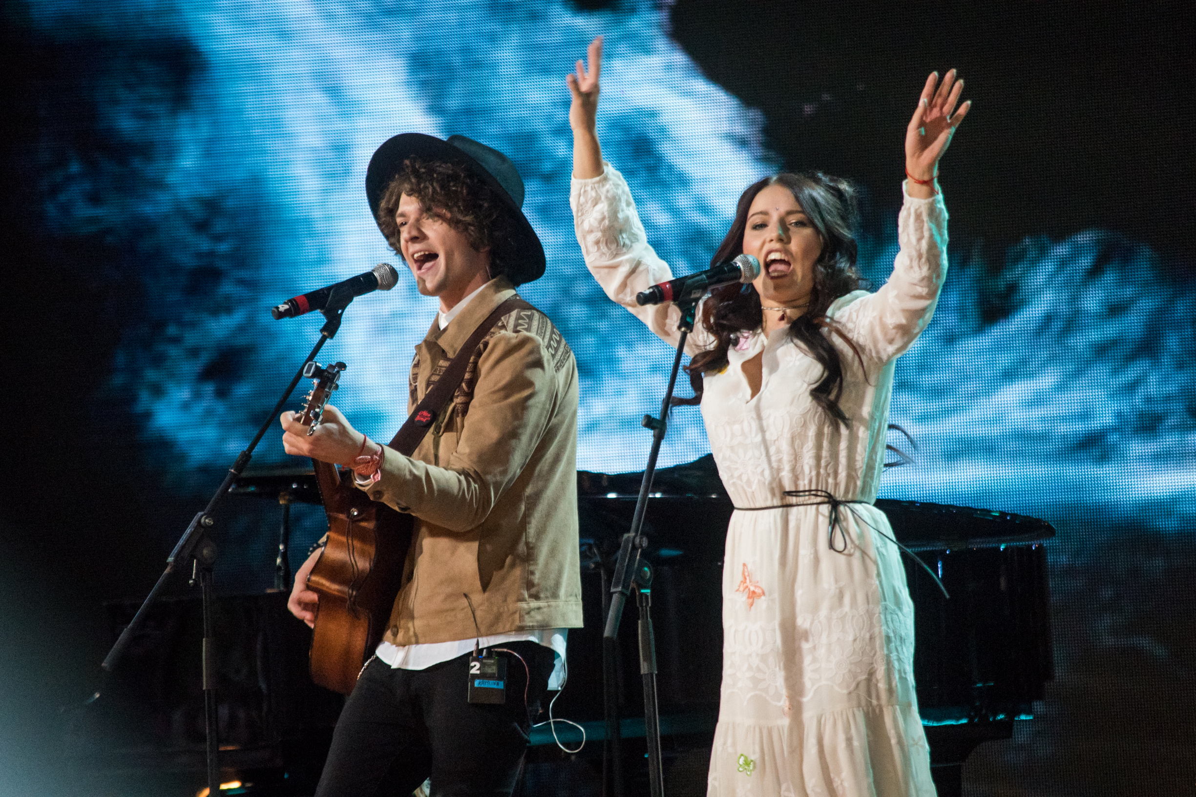 NaviBand на фестивале «Лайма. Рандеву. Юрмала 2017»